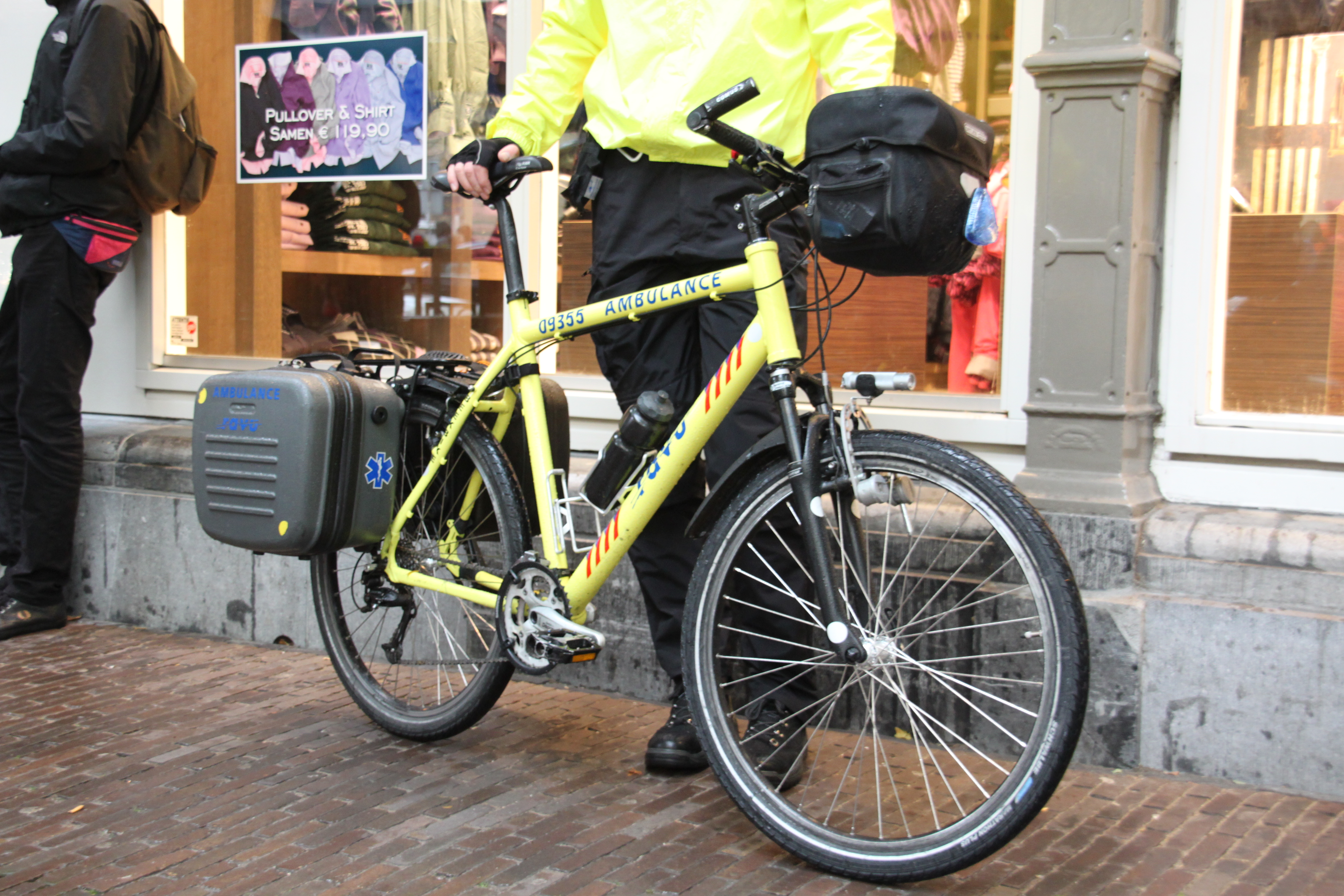 Ambulancefiets in Utrecht